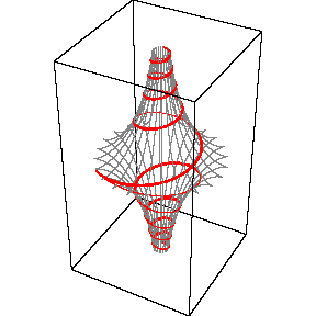 Поверхность из галереи Альфреда Грэя